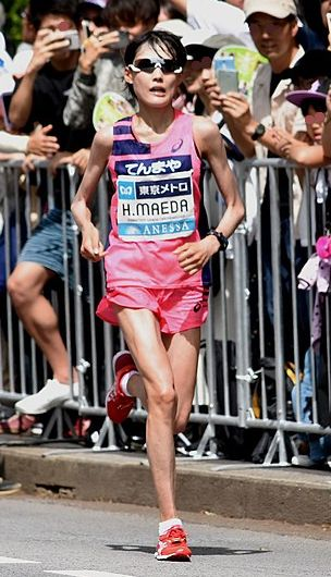 前田 穂南